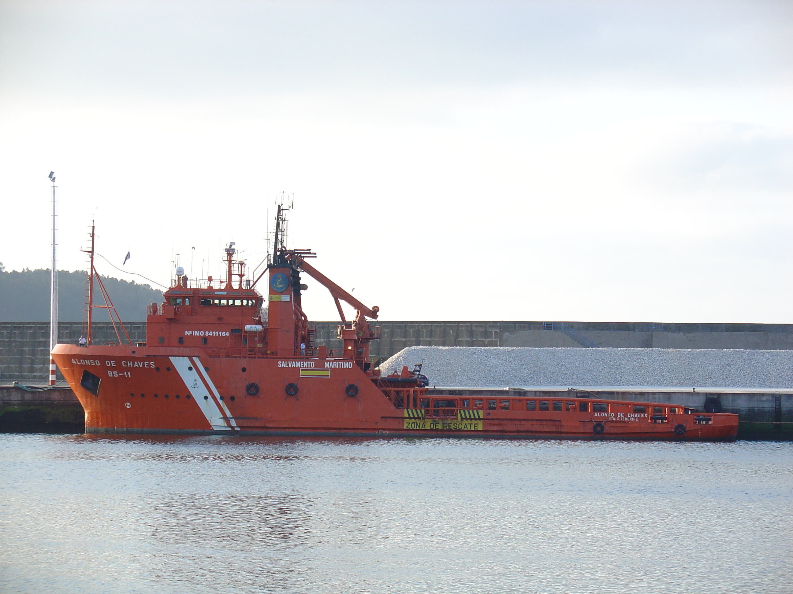 Alonso de Chaves09; Remolcador Alonso de Chaves en el puerto de Celeiro (Viveiro)